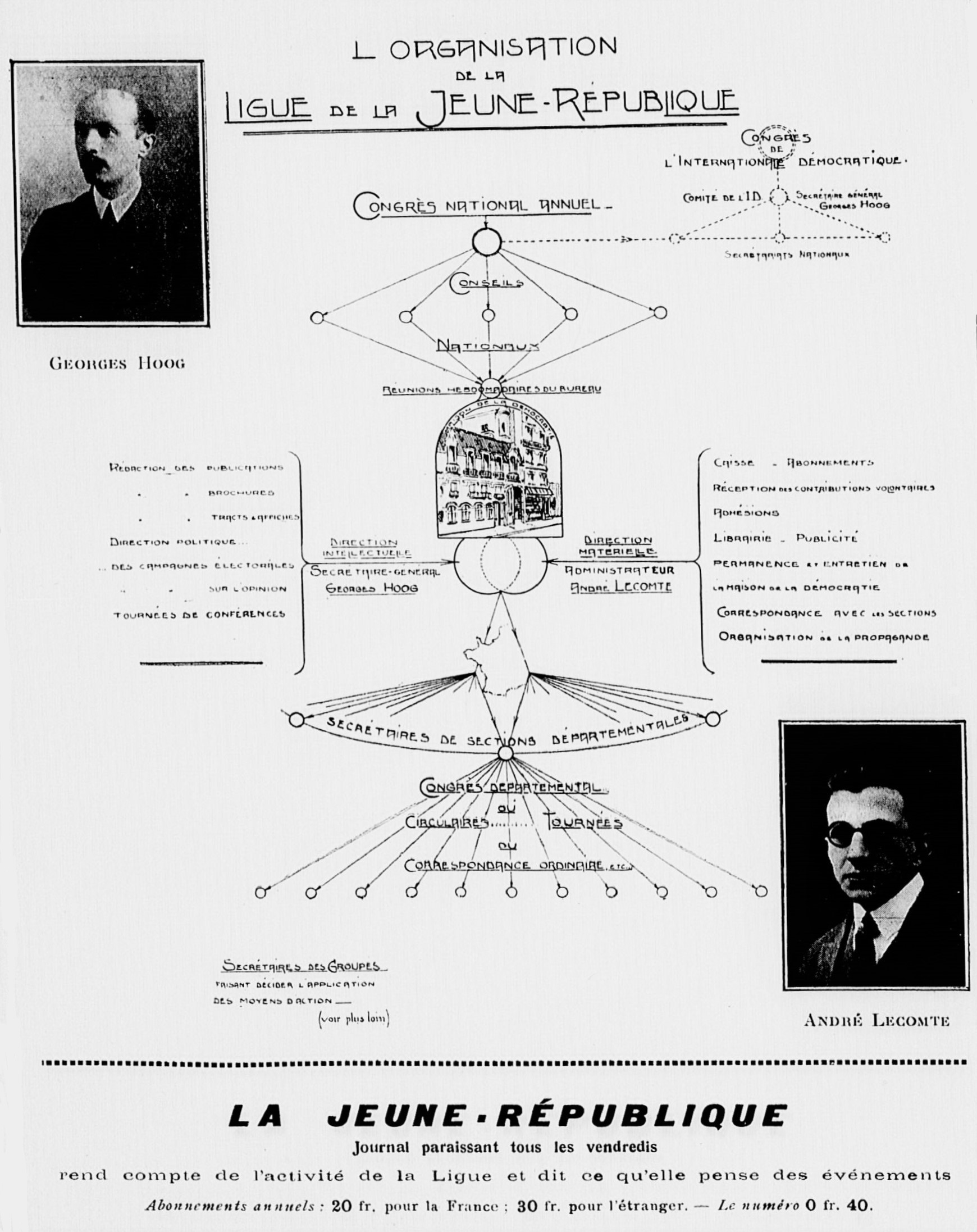 L'organisation de la Ligue de la Jeune République selon l'almanach de la formation, publié en 1929.